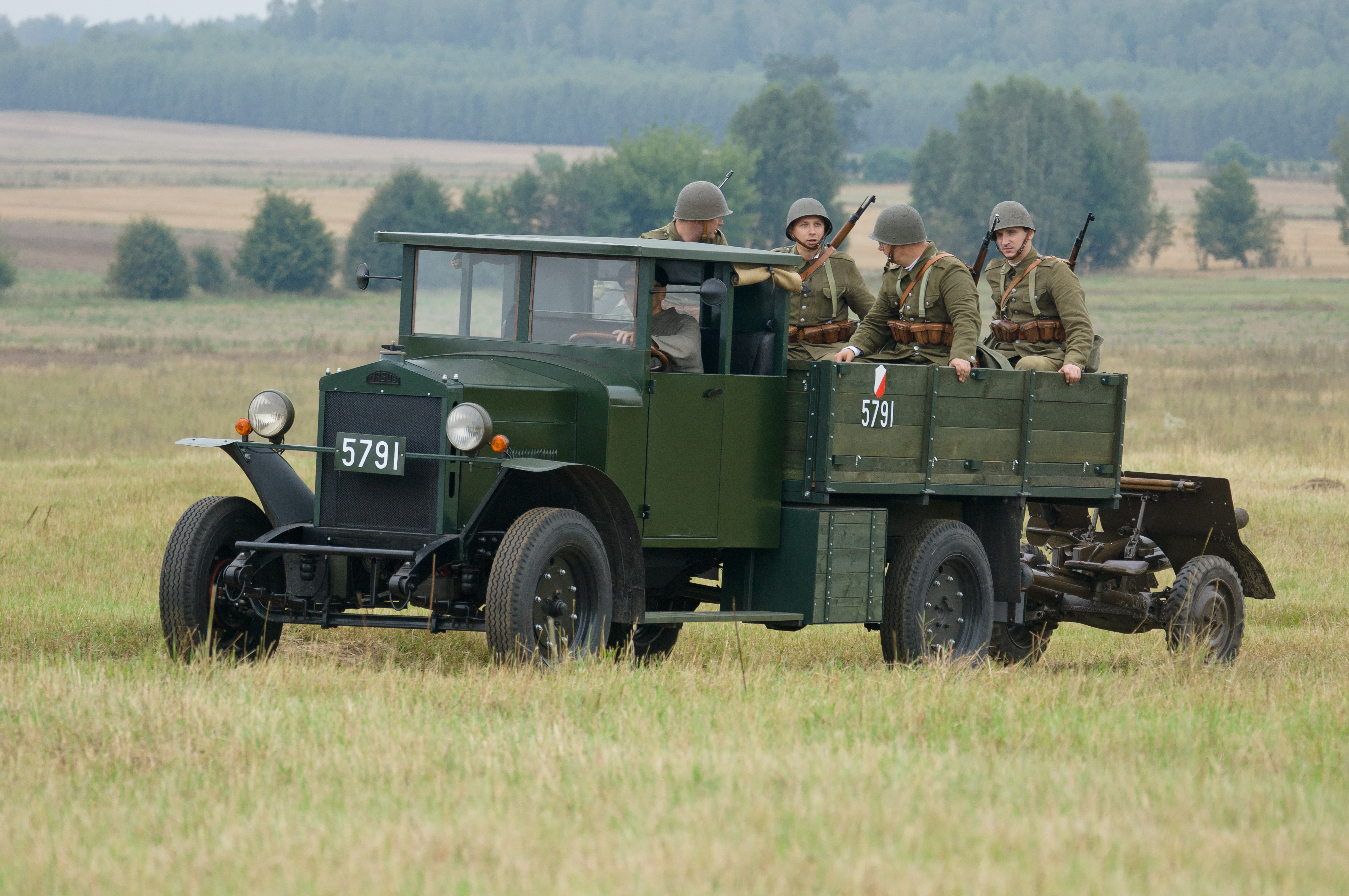 V rekonstrukcja Bitwy pod Mławą, 1. września 2012.